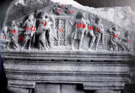 Relief mit dem Giebel des Qurinustempels